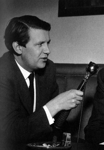 Folke Olhagen